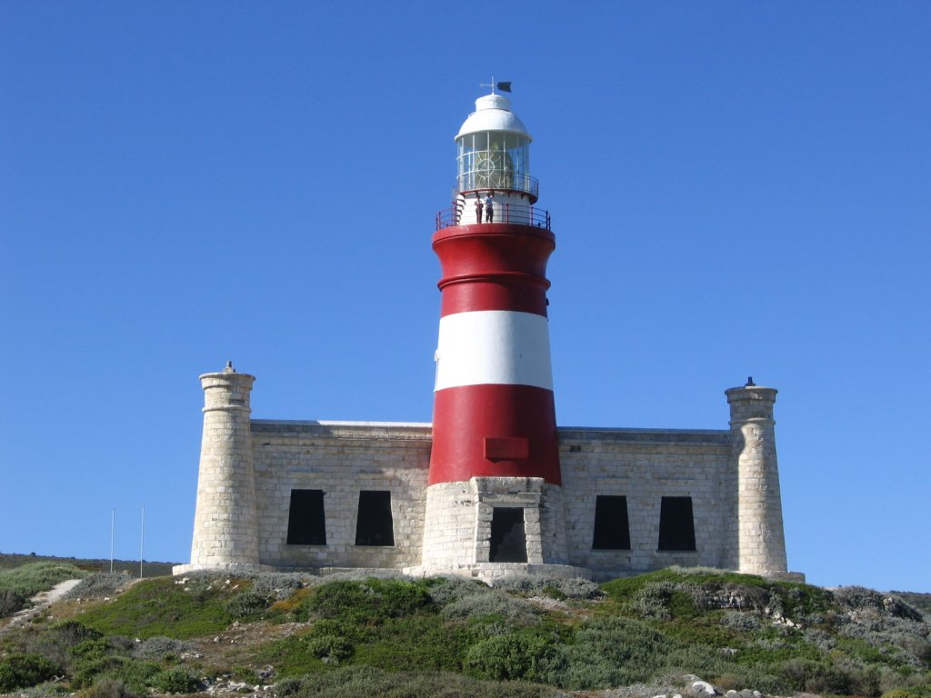 Faro del Cabo Agulhas.